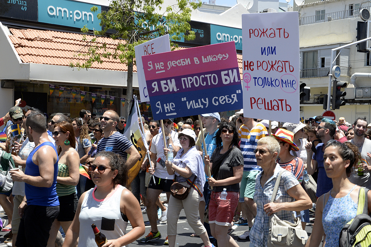 Tel Aviv LGBT pride parade 2015 Tel Aviv Gay Pride Parade 2015